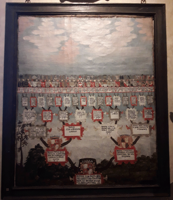 Antavla för Braheätten, upphängd i Östra Ryds kyrka, Uppland